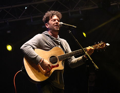 Palo Pandolfo en el Cierre de el Encuentro Federal de la Palabra.